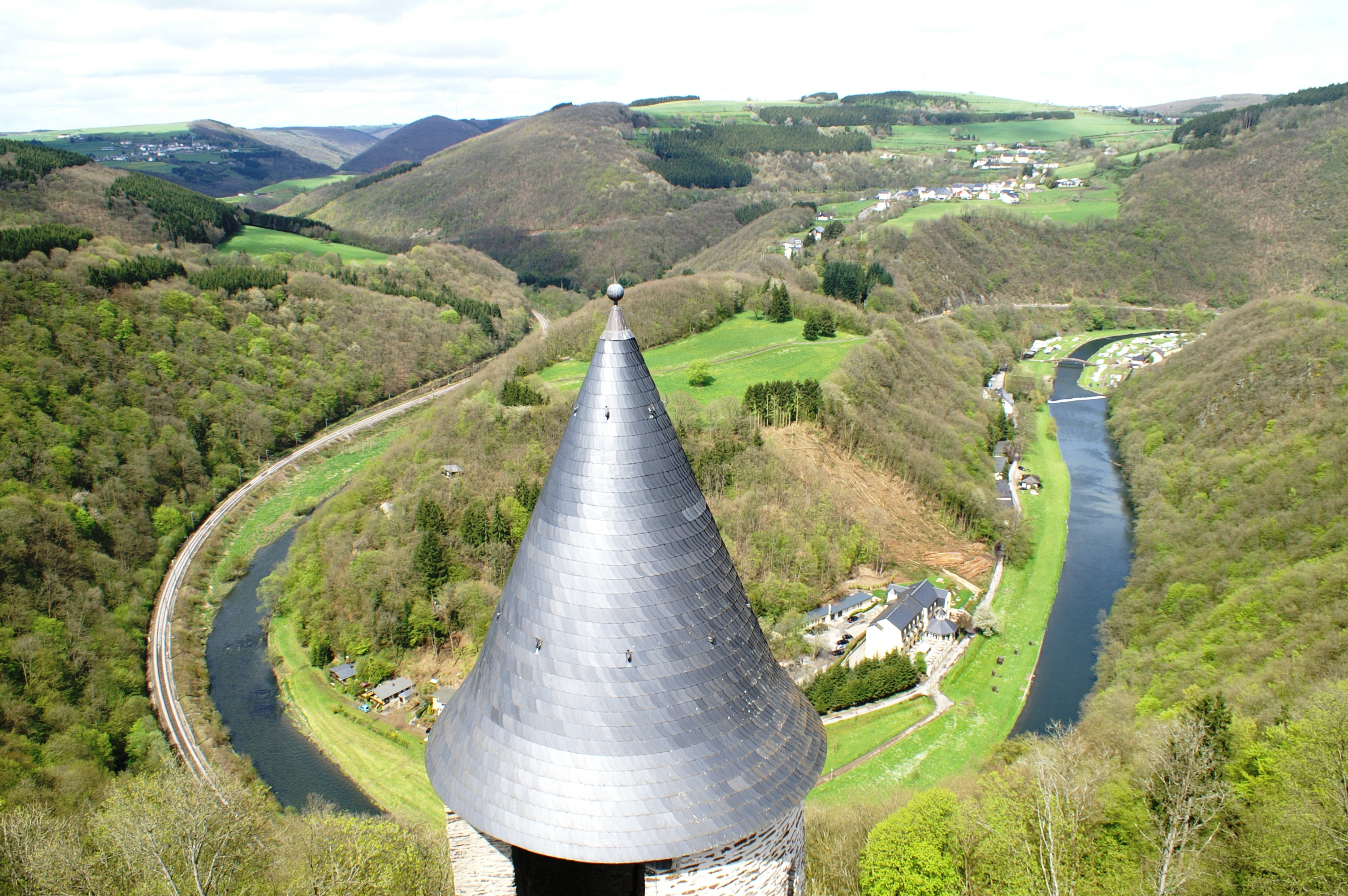 Kasteel in Luxemburg